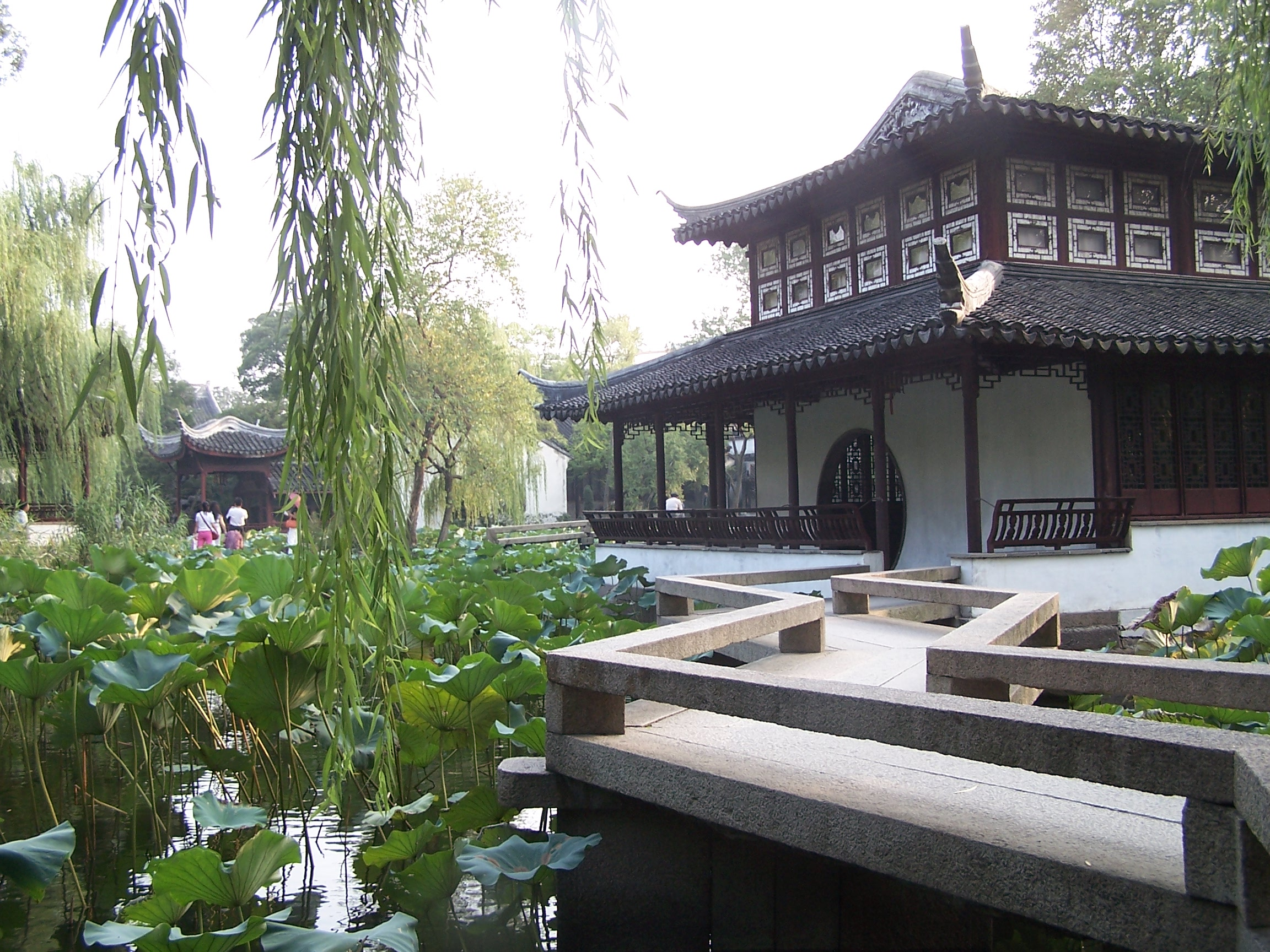 Maison à étages d'où l'on voit les montagnes